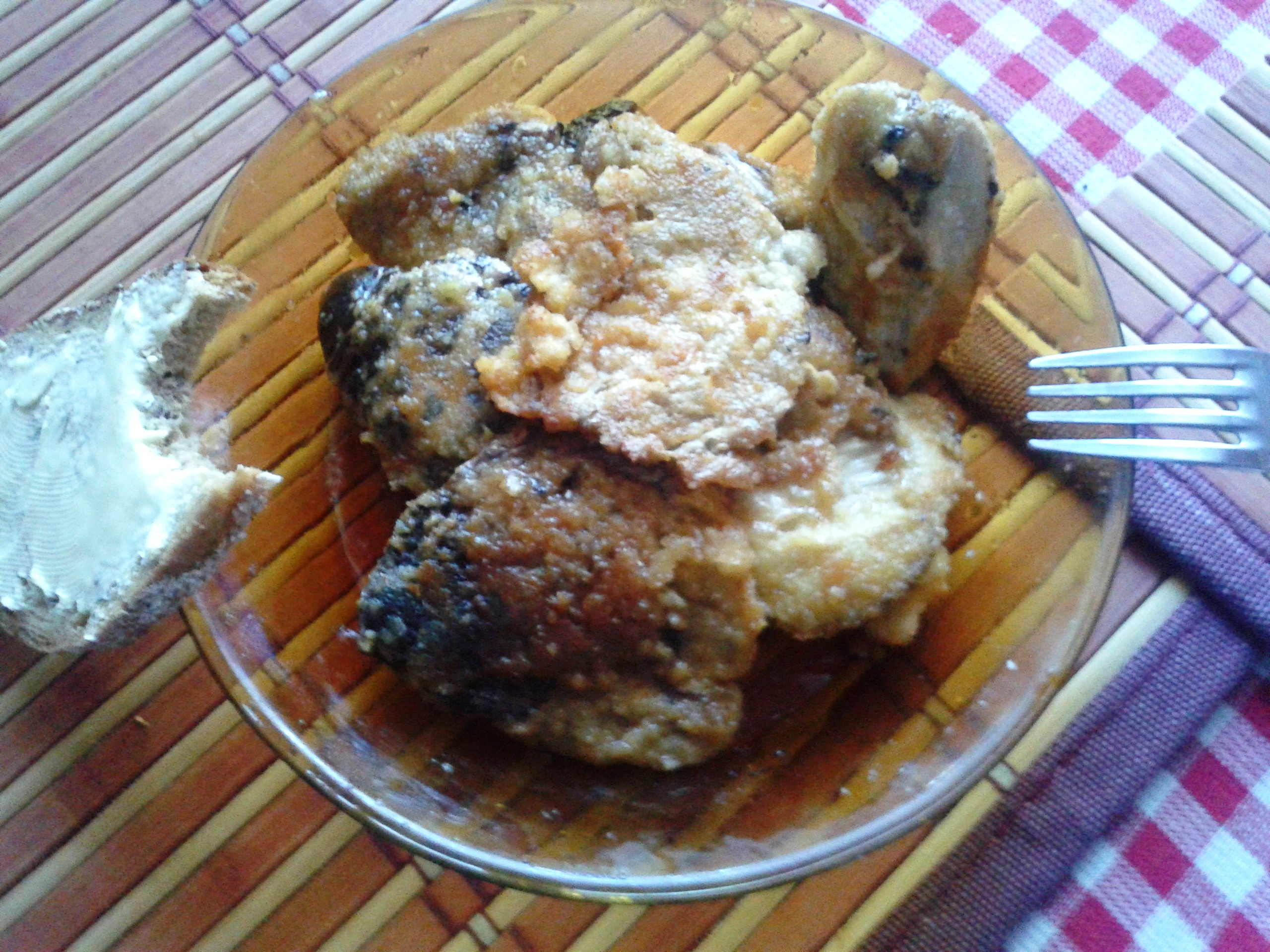 Czubajka procera w panierce